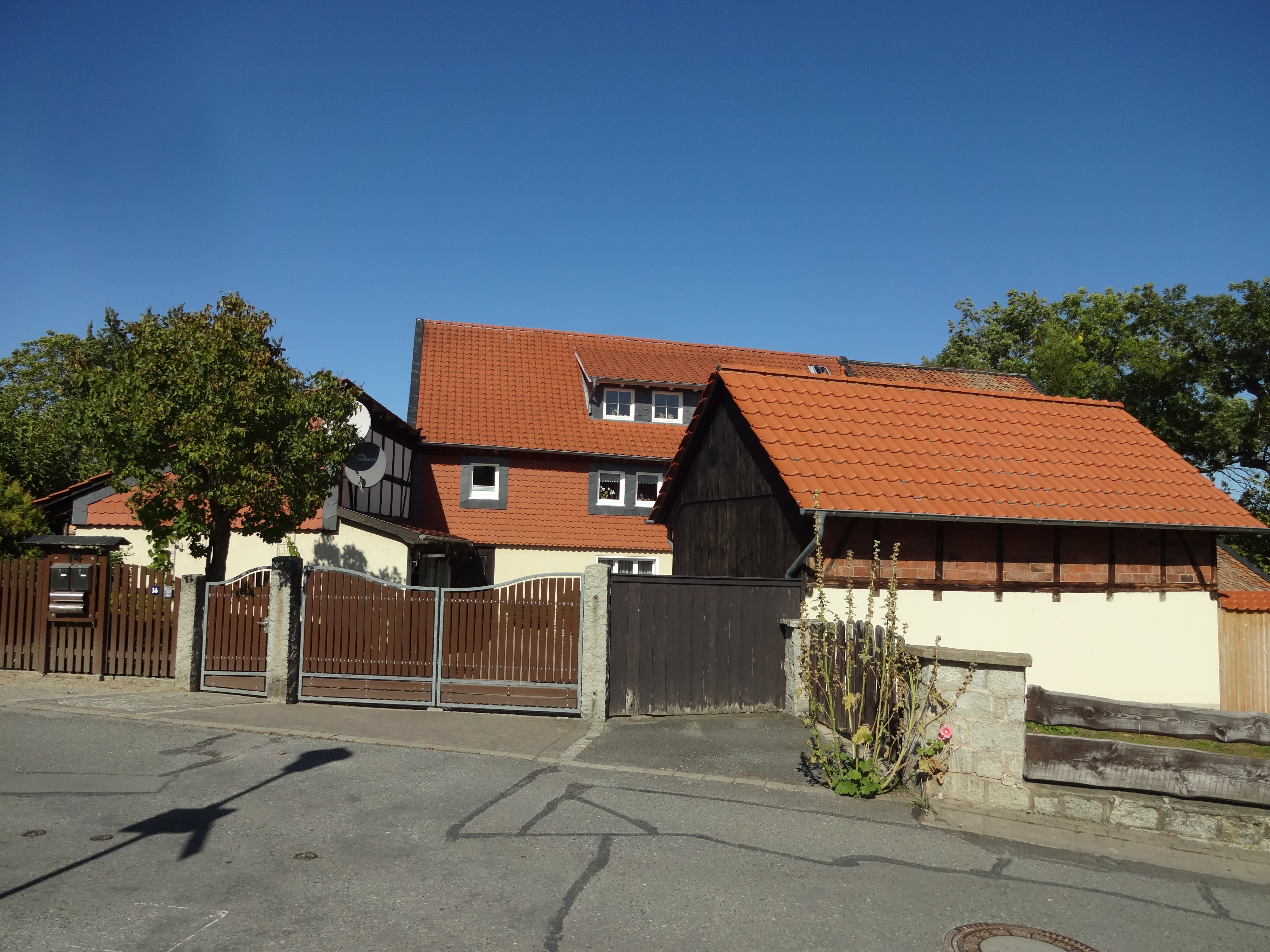 Wohnhaus in der Straße Am Kamp 14 in Drübeck, das Gebäude war denkmalgeschützt